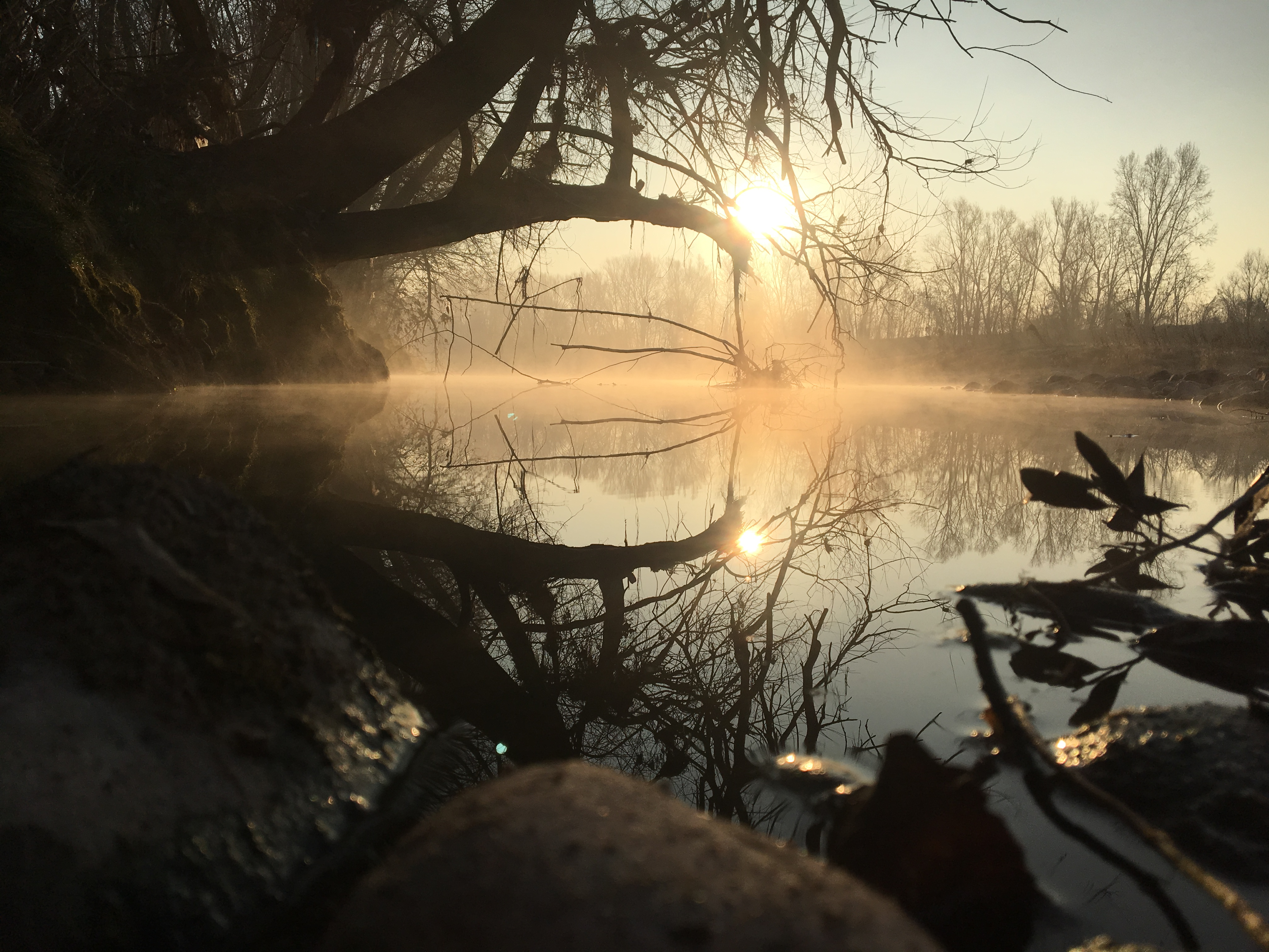 Alba nel fiume Adige nel comune di Verona in località Porto s. Pancrazio in zona riserva di pesca e ripopolamento trota marmorata